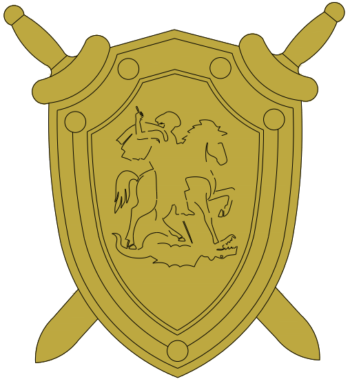 Эмблема СКР